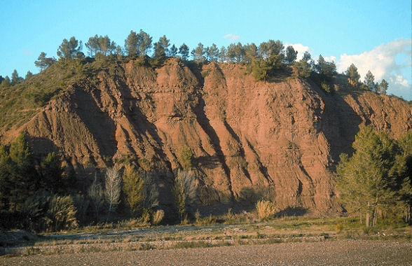 Lutites continentals a Sallent, Bages.